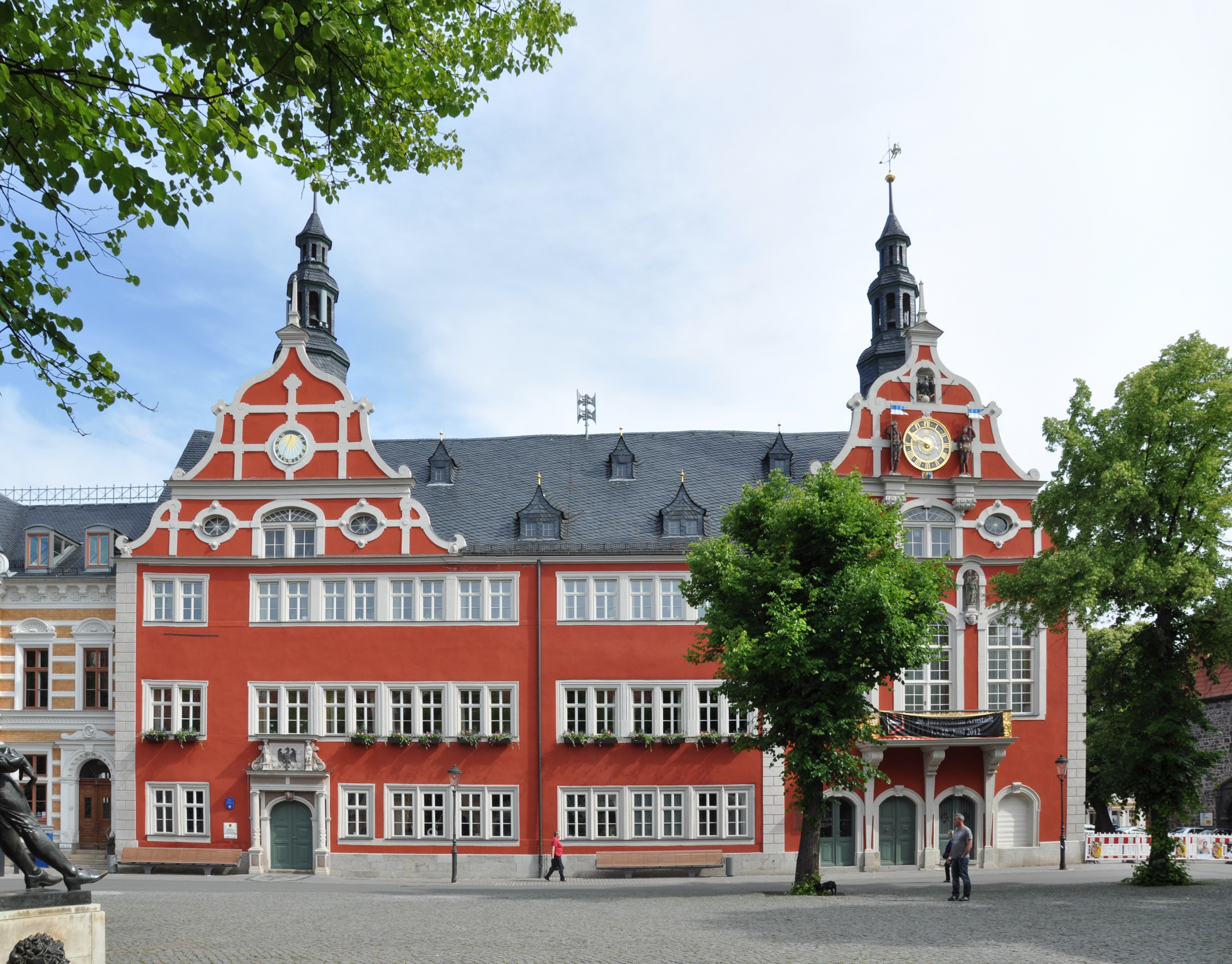 Arnstadt (Thüringen), Rathaus